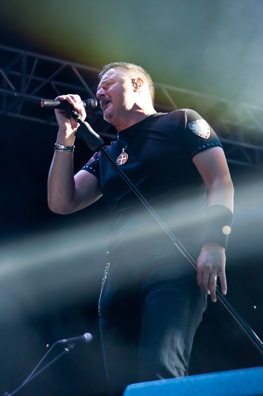 Marko Perković u Crikvenici